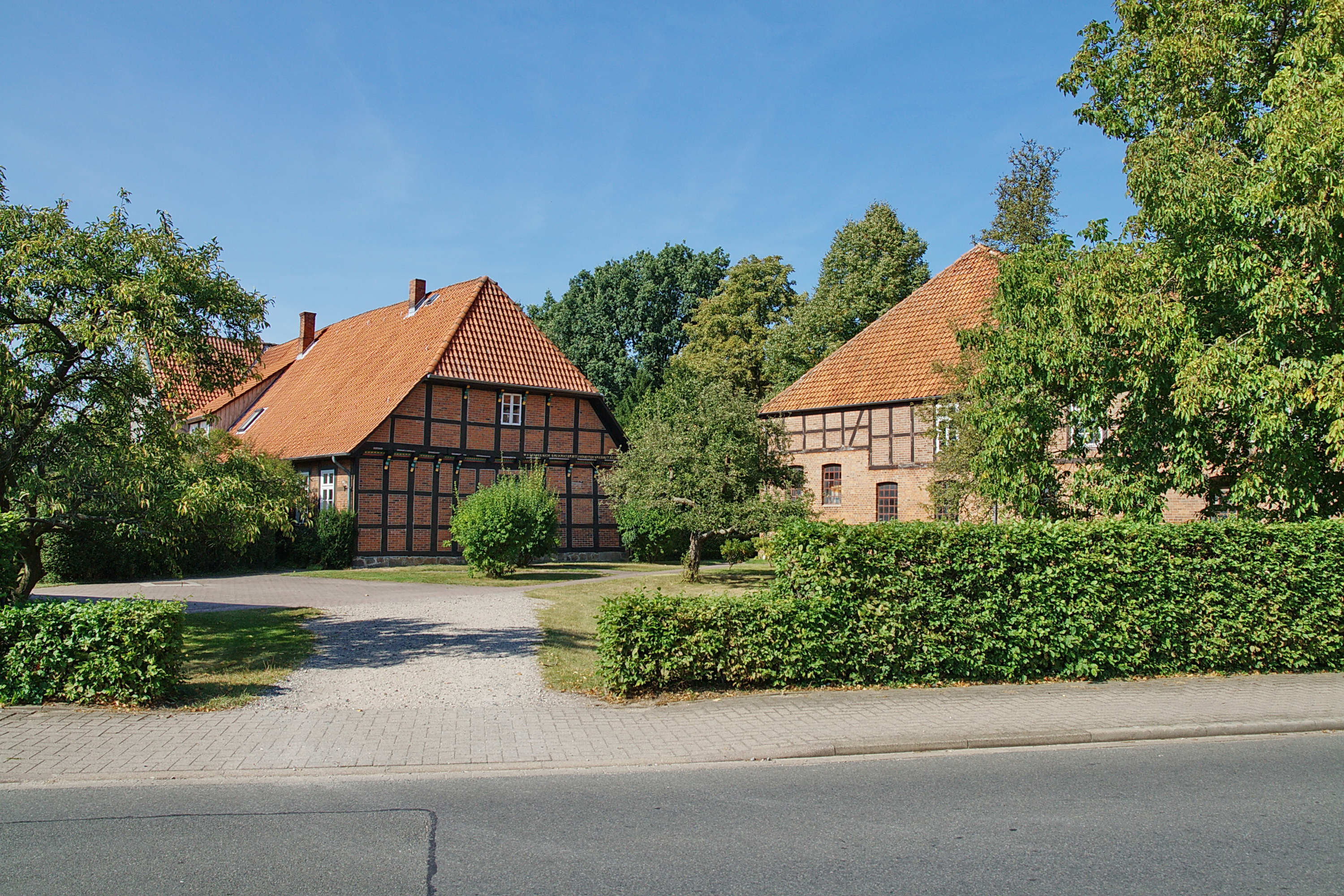 Fachwerk in Bröckel, Niedersachsen, Deutschland.